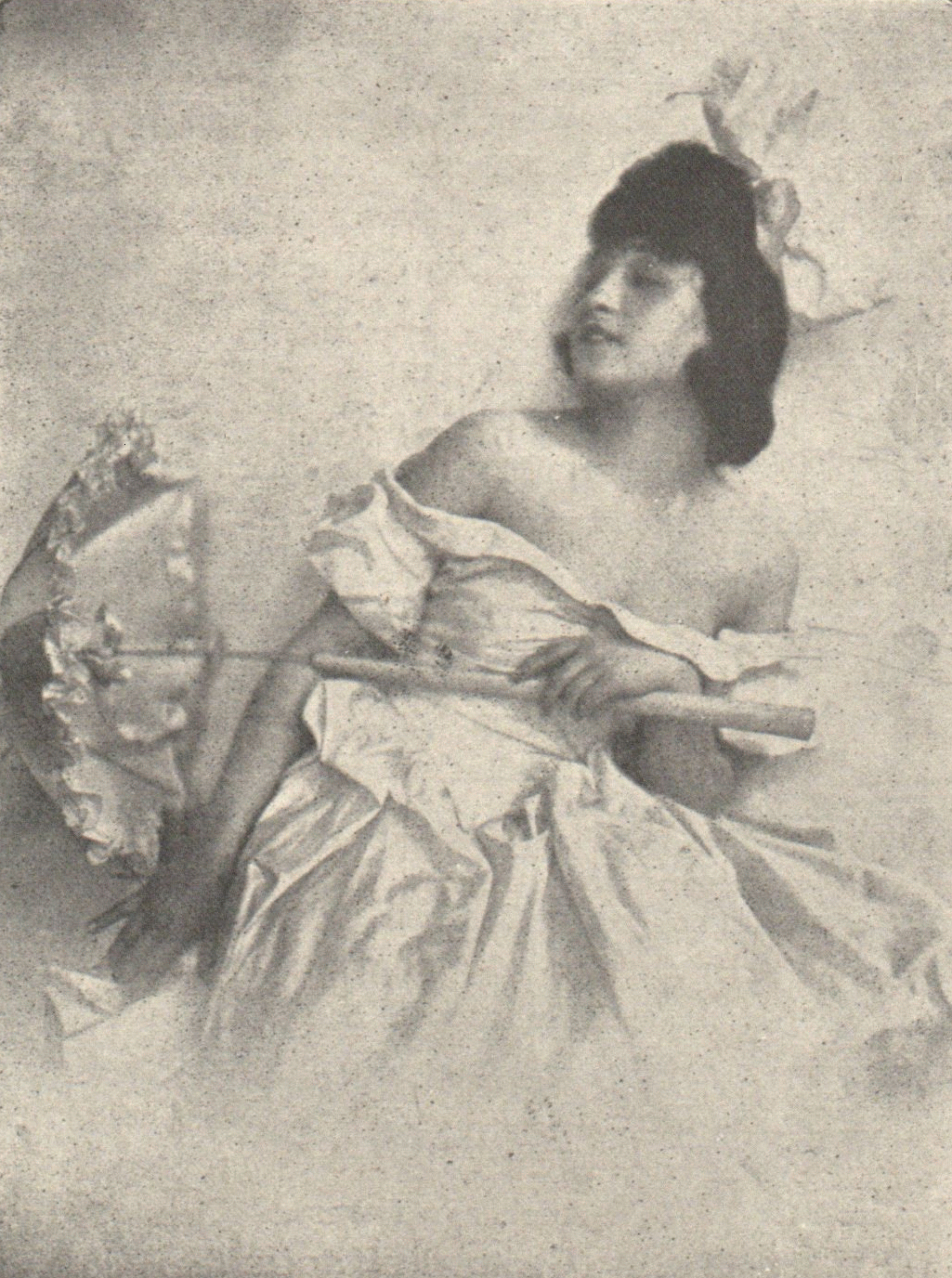 Lena Amsel (1898-1929), dancer and actress